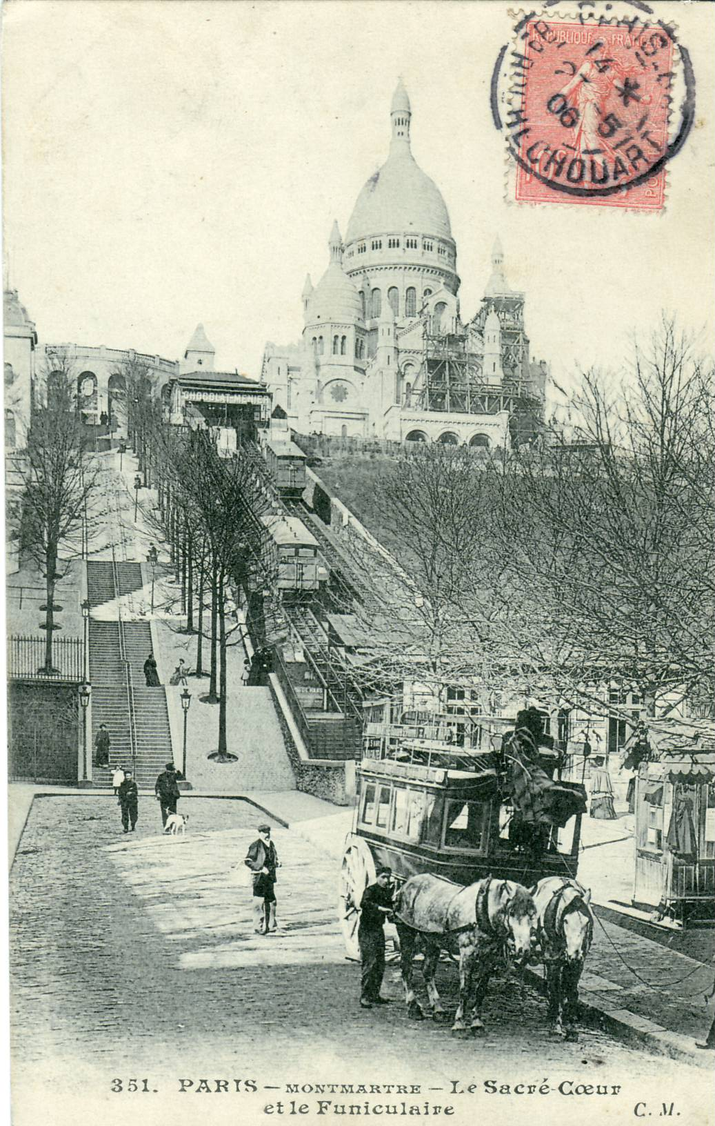 Carte postale ancienne éditée par CM N° 351 PARIS : Montmartre - le Sacré Cœur et le Funiculaire